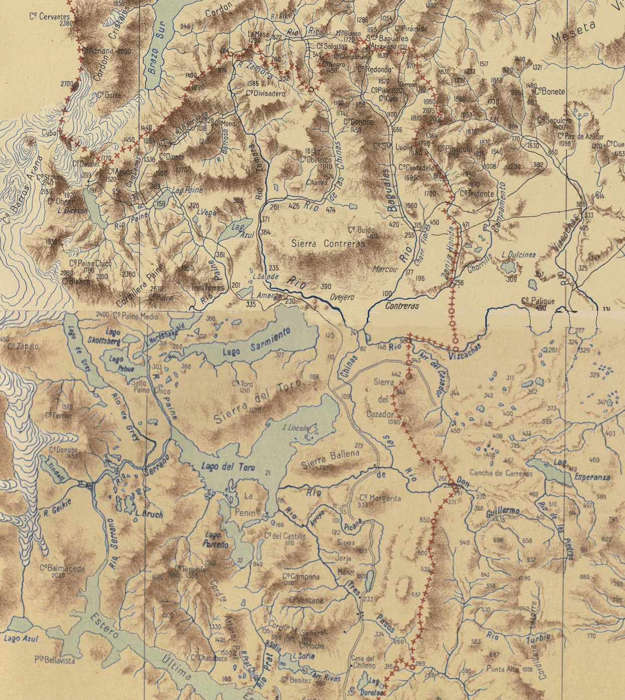 Cuenca del río Serrano en un mapa compuesto de dos mapas de Luis Risopatrón.